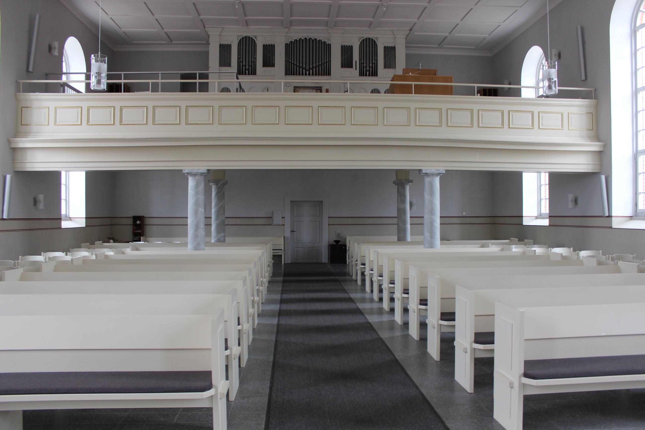 Die St. Michaeliskirche (Bienenbüttel) von innen mit Sitzbänken und Orgel